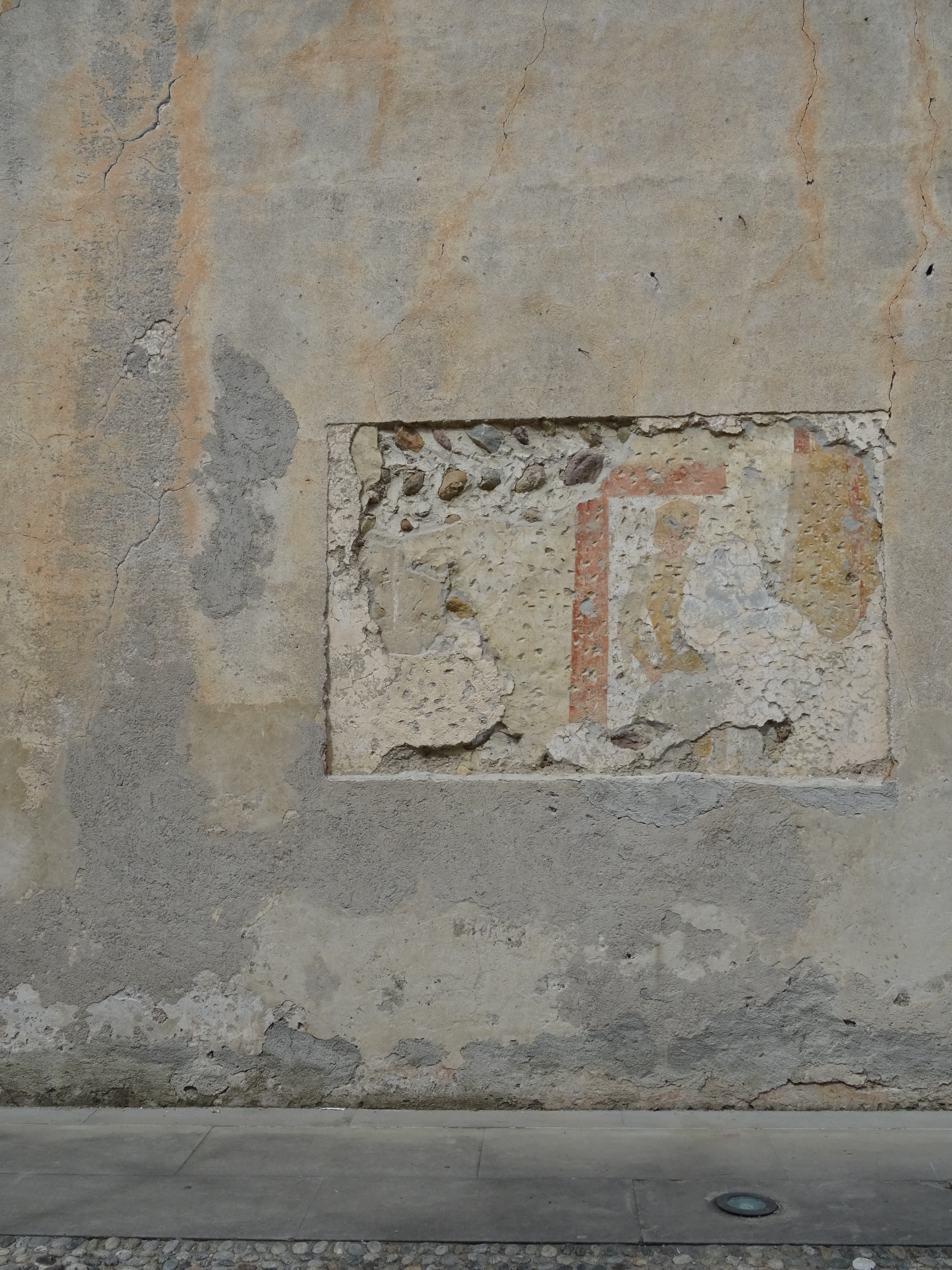 dettaglio della decorazione muraria a sinistra della porta sul lato sud